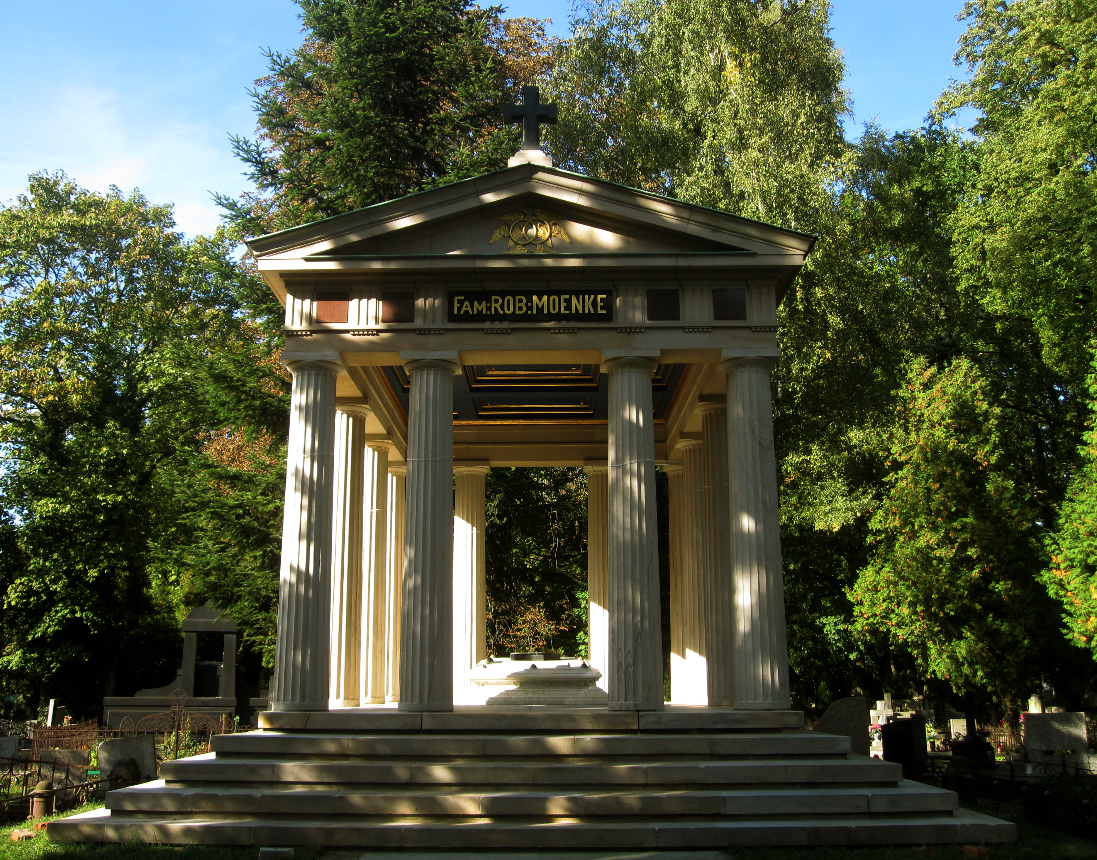 Łódź, cmentarz rzymsko-katolicki, 2 poł. XIX